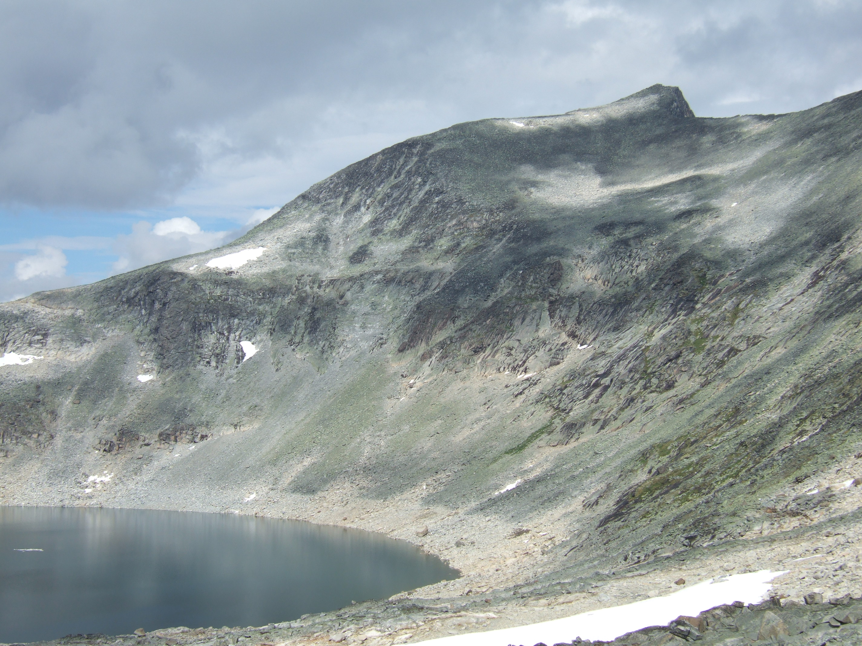 Søre Hellestugtinden sett fra Semelholet, Jotunheimen.